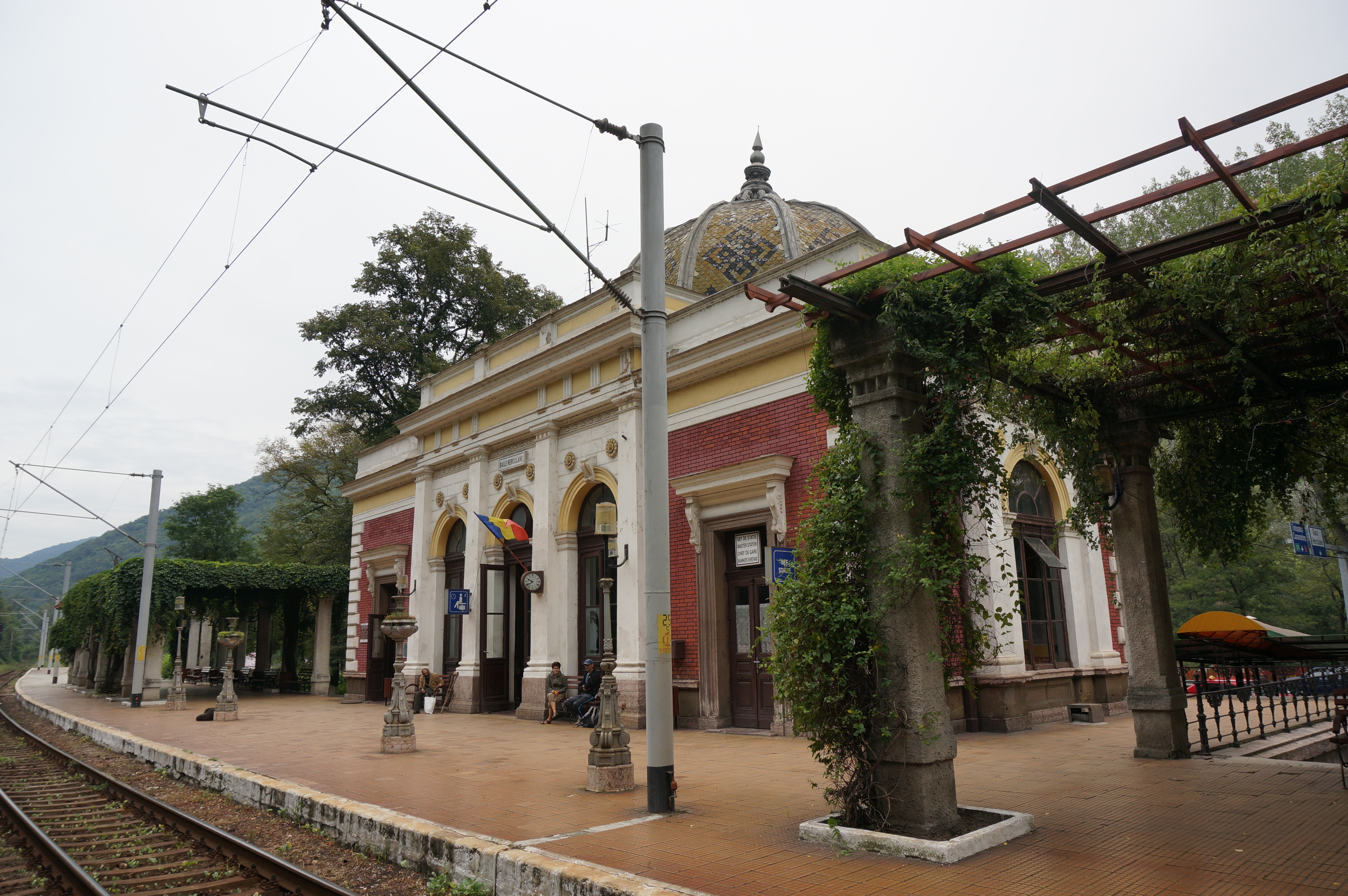 La gare, classée monument historique.